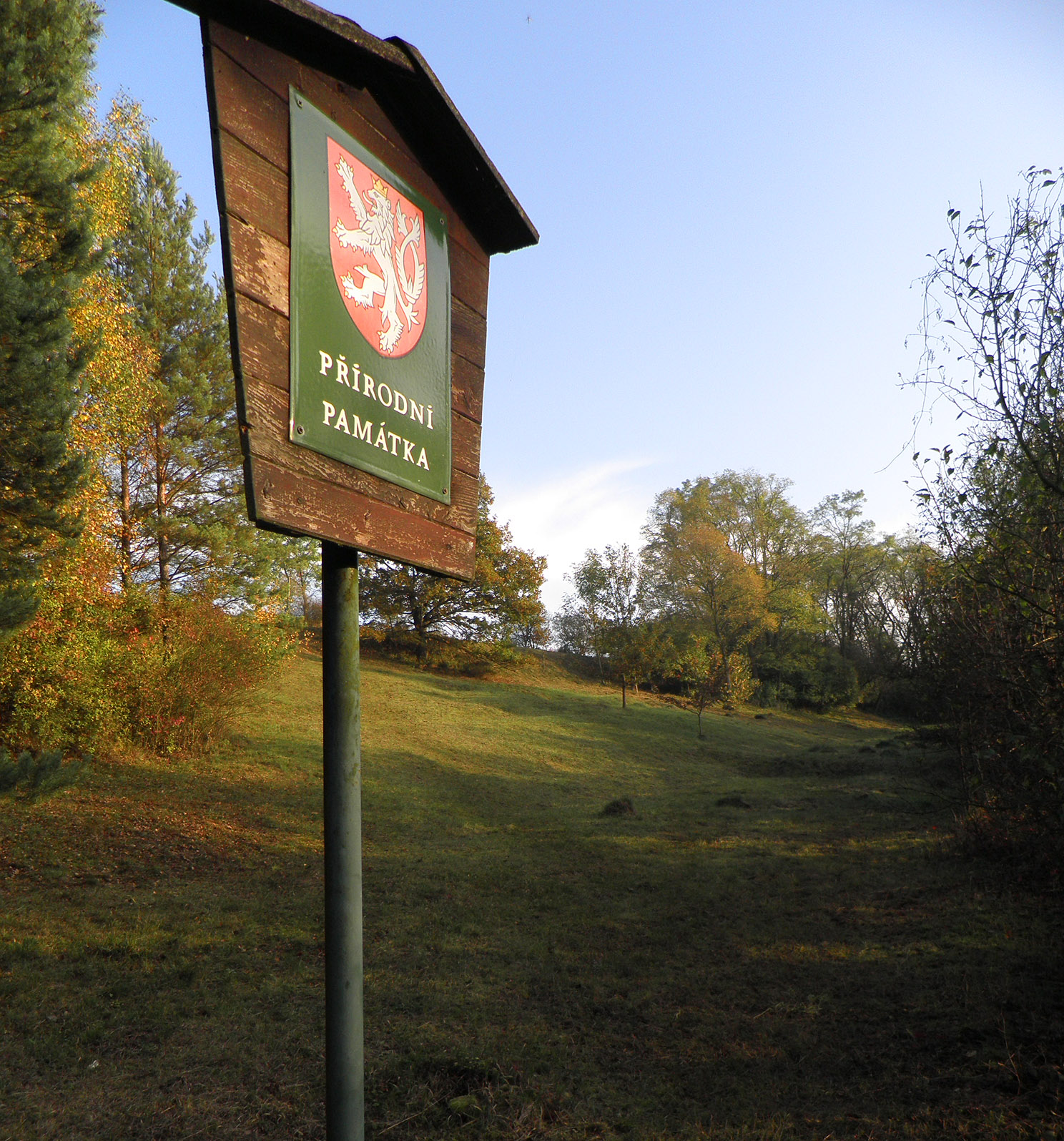 PP Radouň, ochrana jsou opukové stráně s výskytem vstavače vojenského a populací dalších na ně vázaných druhů.